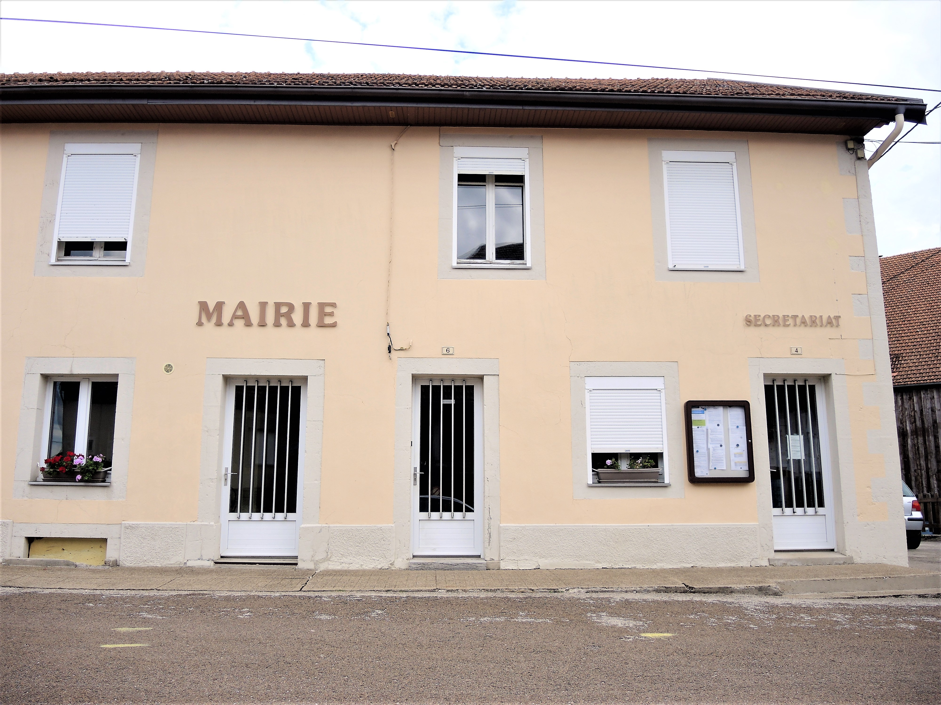 Façade de la mairie de Cuvier. Jura.